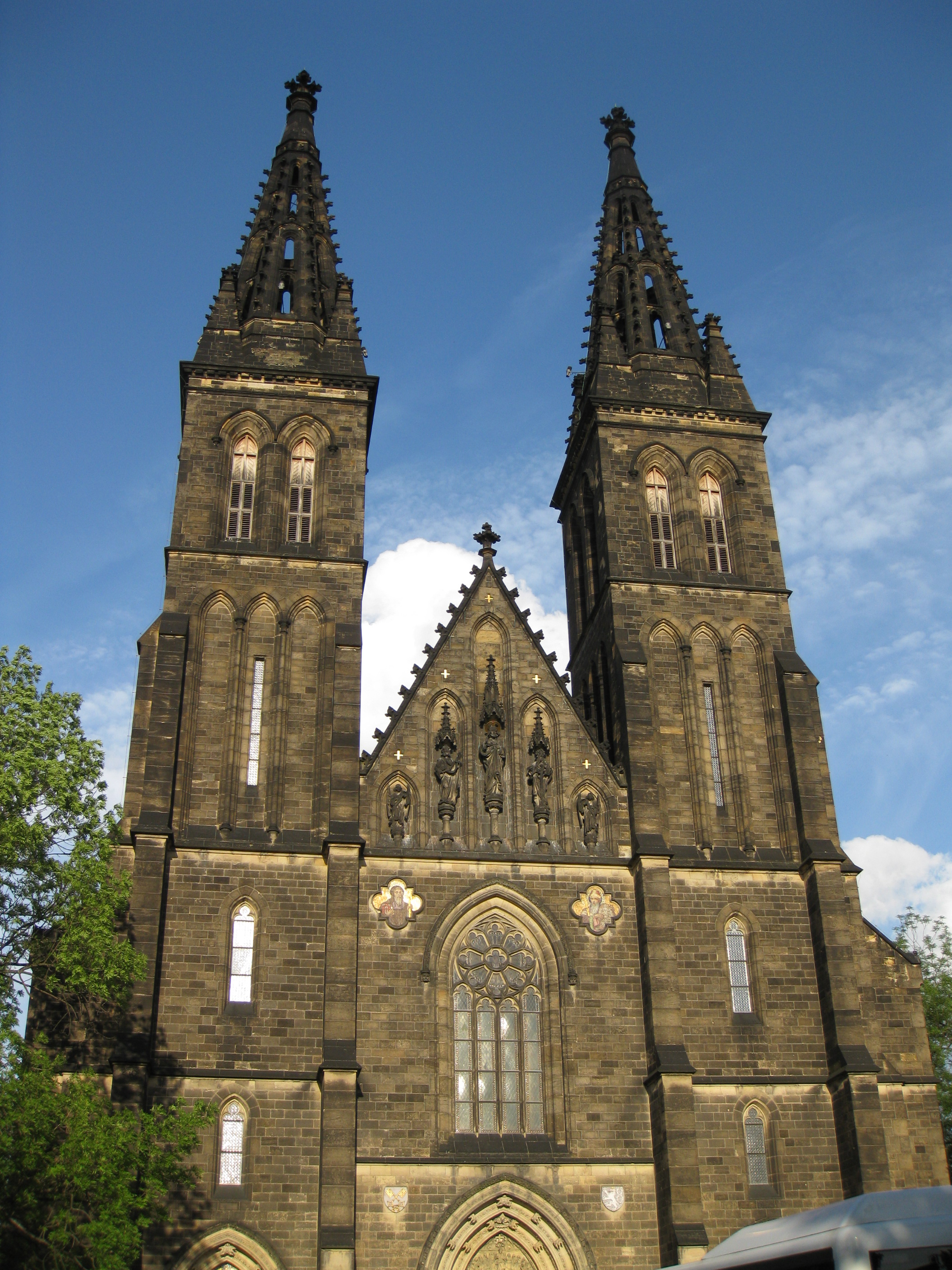 Pevnost Vyšehrad, Praha 2-Vyšehrad, Soběslavova 14/1, V pevnosti 16/2, 35/11, K rotundě 16/3, 81/6, 82/8, 90/12, 91/14, 92/16, 100/10, Štulcova 89/1, 102/2, 69/3